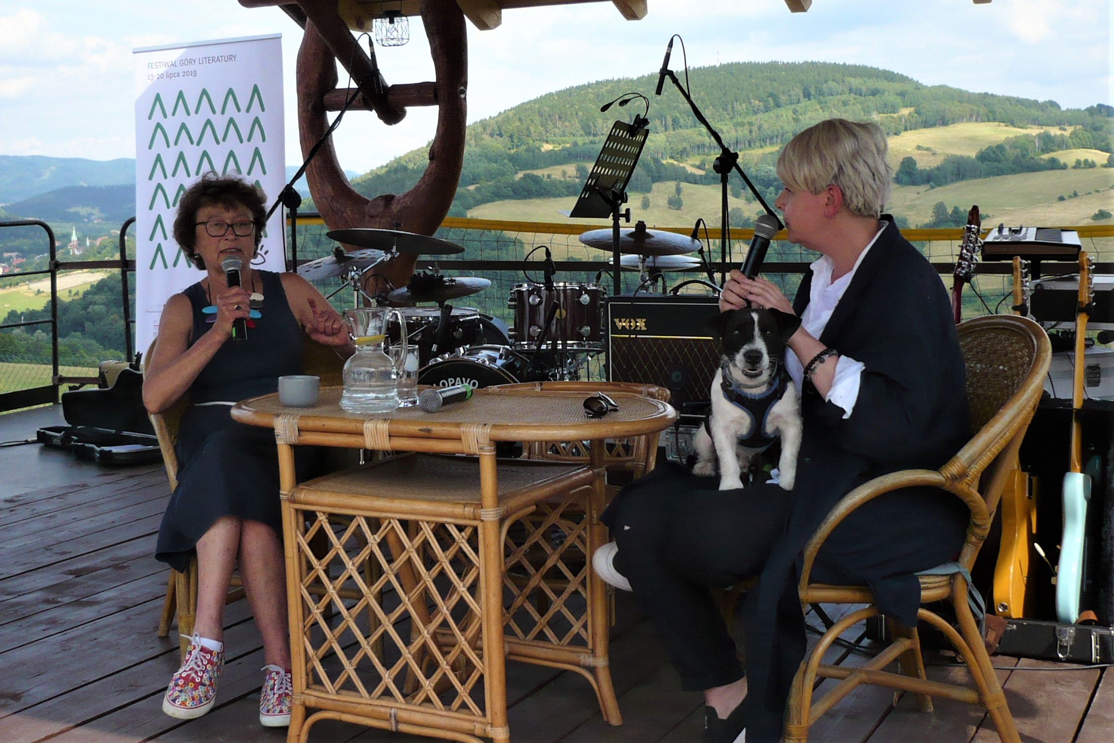 Dorota Sumińska, Karolina Korwin Piotrowska, Festiwal Góry Literatury, 2019